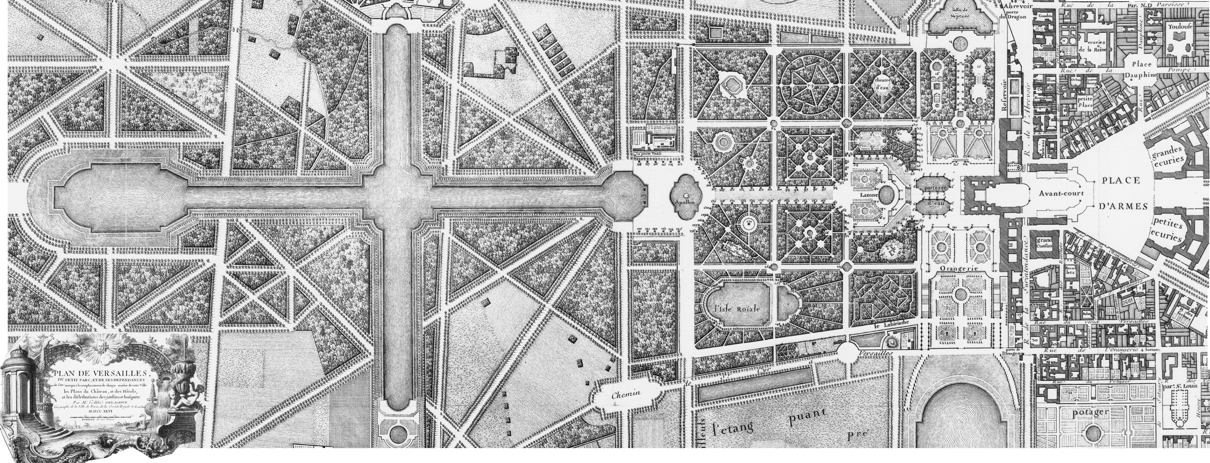 Extrait du "Plan de Versailles, du petit parc, et de ses dependances où sont marqués les emplacemens de chaque maison de cette ville, les plans du Château, et des hôtels, et les distributions des jardins et bosquets" par Mr l'abbé Delagrive (1689-1757) - M D CC XLVI (1746)